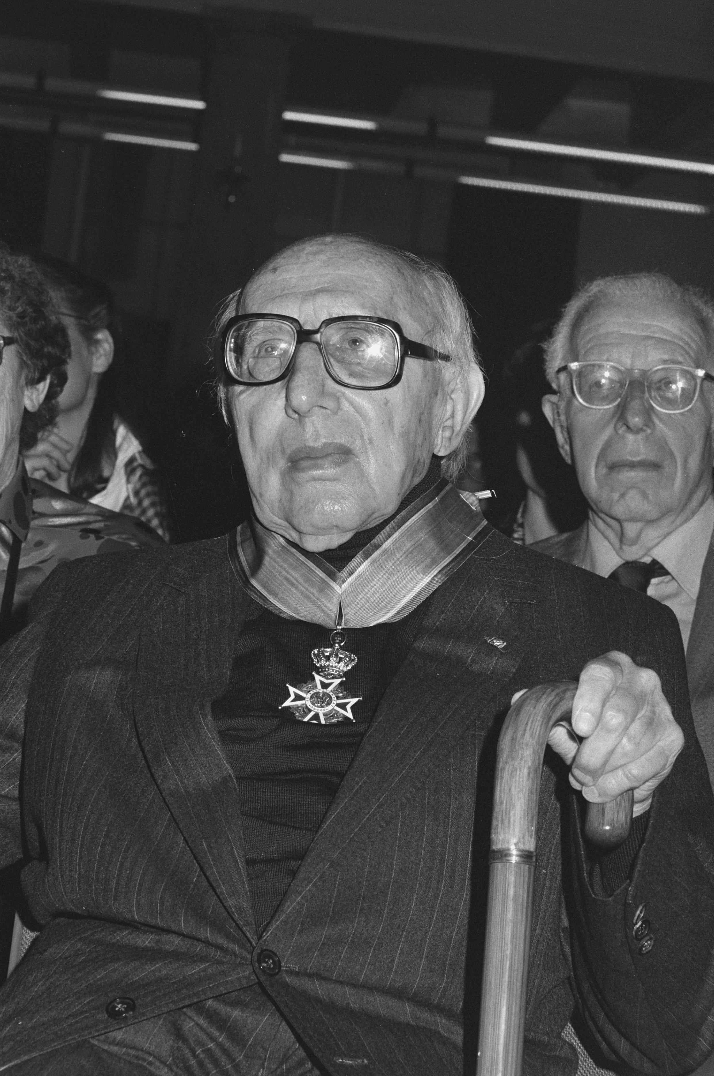 Collectie / Archief : Fotocollectie Anefo Reportage / Serie : [ onbekend ] Beschrijving : Socioloog Norbert Elias onderscheiden door minister Deetman (Amsterdam) Datum : 22 juni 1987 Locatie : Amsterdam, Noord-Holland Trefwoorden : onderscheidingen, sociologen Persoonsnaam : Deetman, Wim Fotograaf : Bogaerts, Rob / Anefo Auteursrechthebbende : Nationaal Archief Materiaalsoort : Negatief (zwart/wit) Nummer archiefinventaris : bekijk toegang 2.24.01.05 Bestanddeelnummer : 934-0168